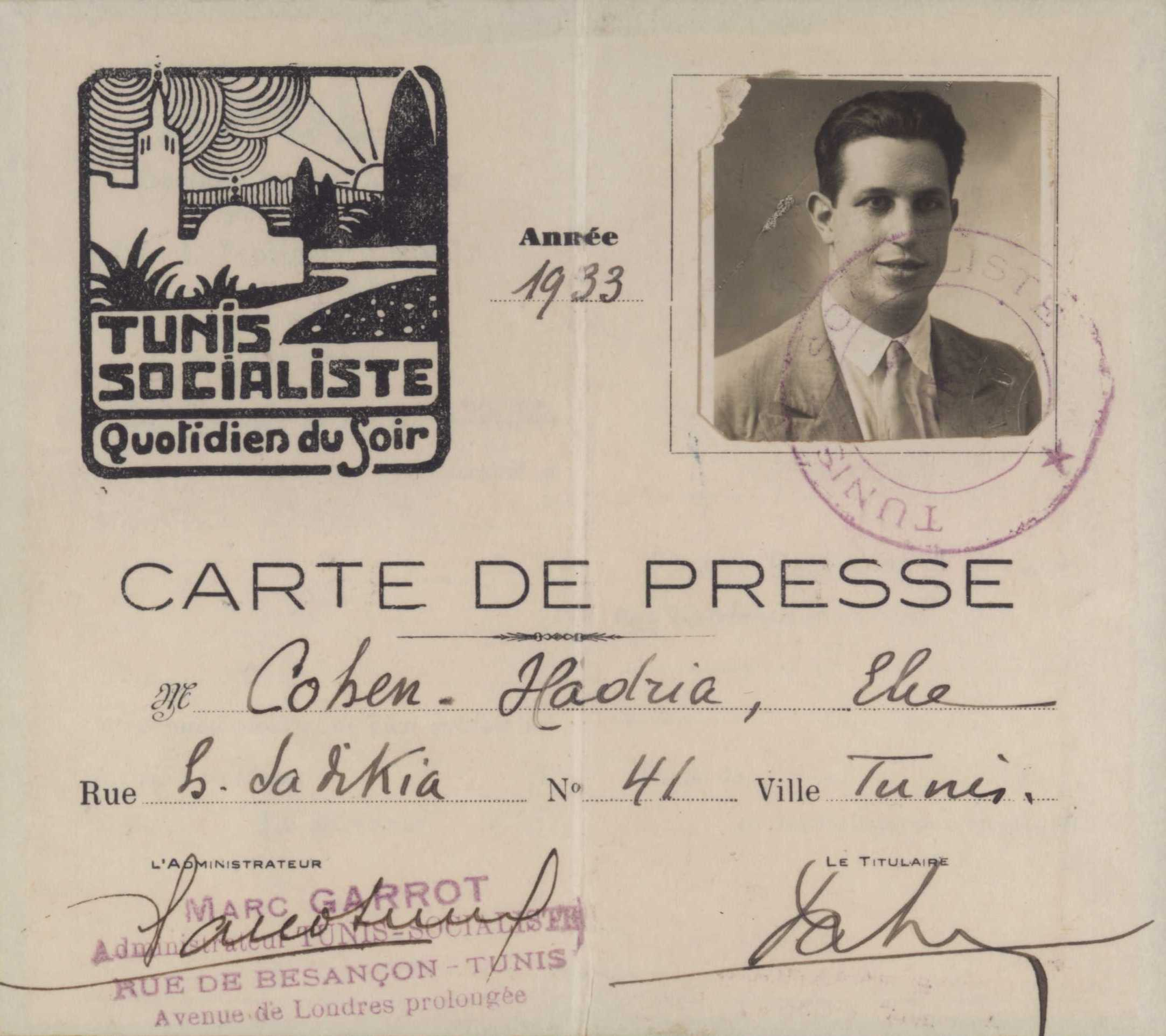 Carte de presse 1933 d'Elie Cohen-Hadria, avec sa photo et sa signature, et le logo de son journal Tunis Socialiste.